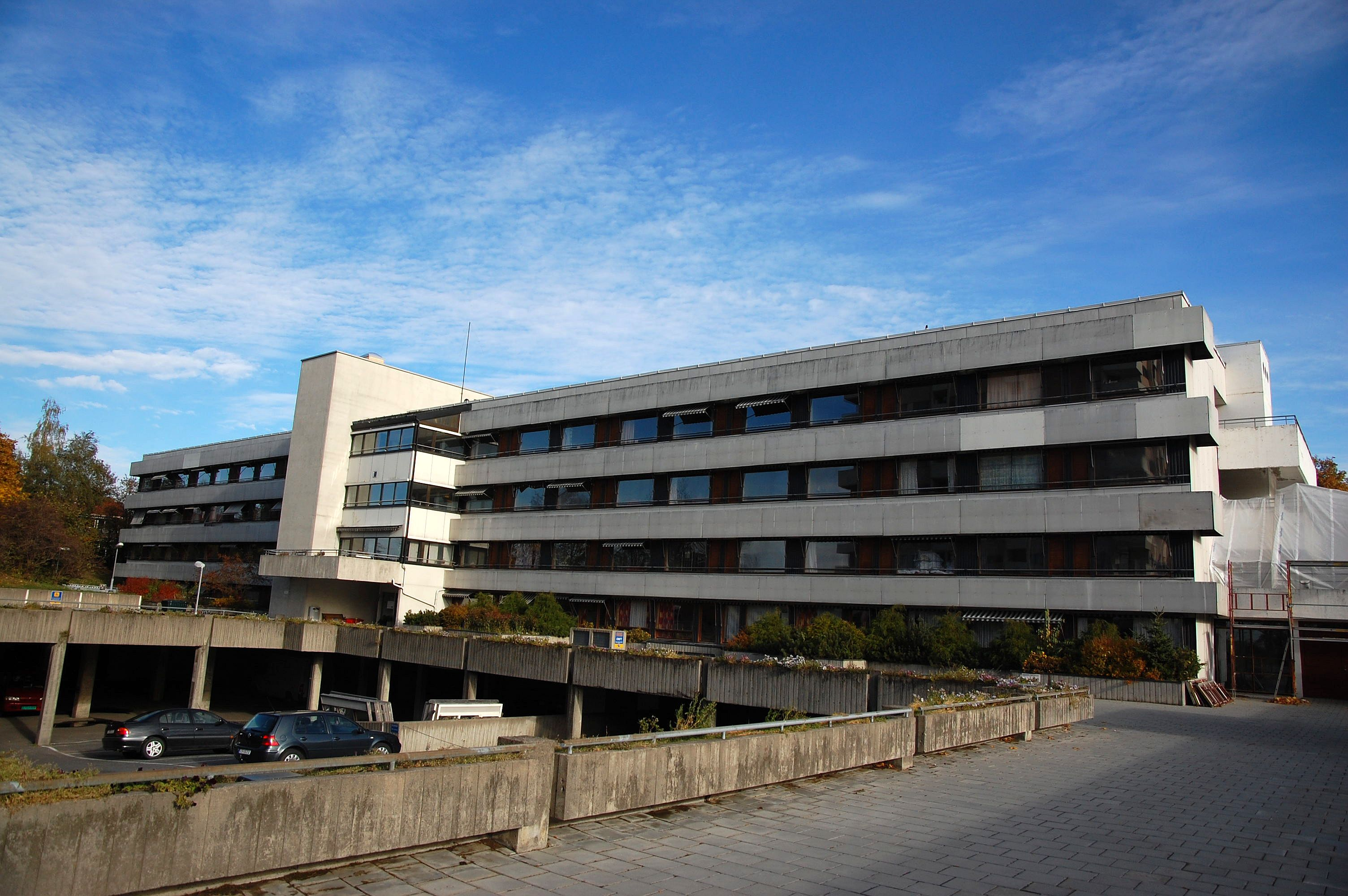 Økern alders- og sykehjem på Økern i Oslo, tegnet i 1955 av arkitektene Sverre Fehn og Geir Grung. For sin tegning av bygningen fikk arkitektene i 1961 Houens fonds diplom. Økernveien 151